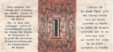 Lagergeld Frankreich , Zweiter Weltkrieg